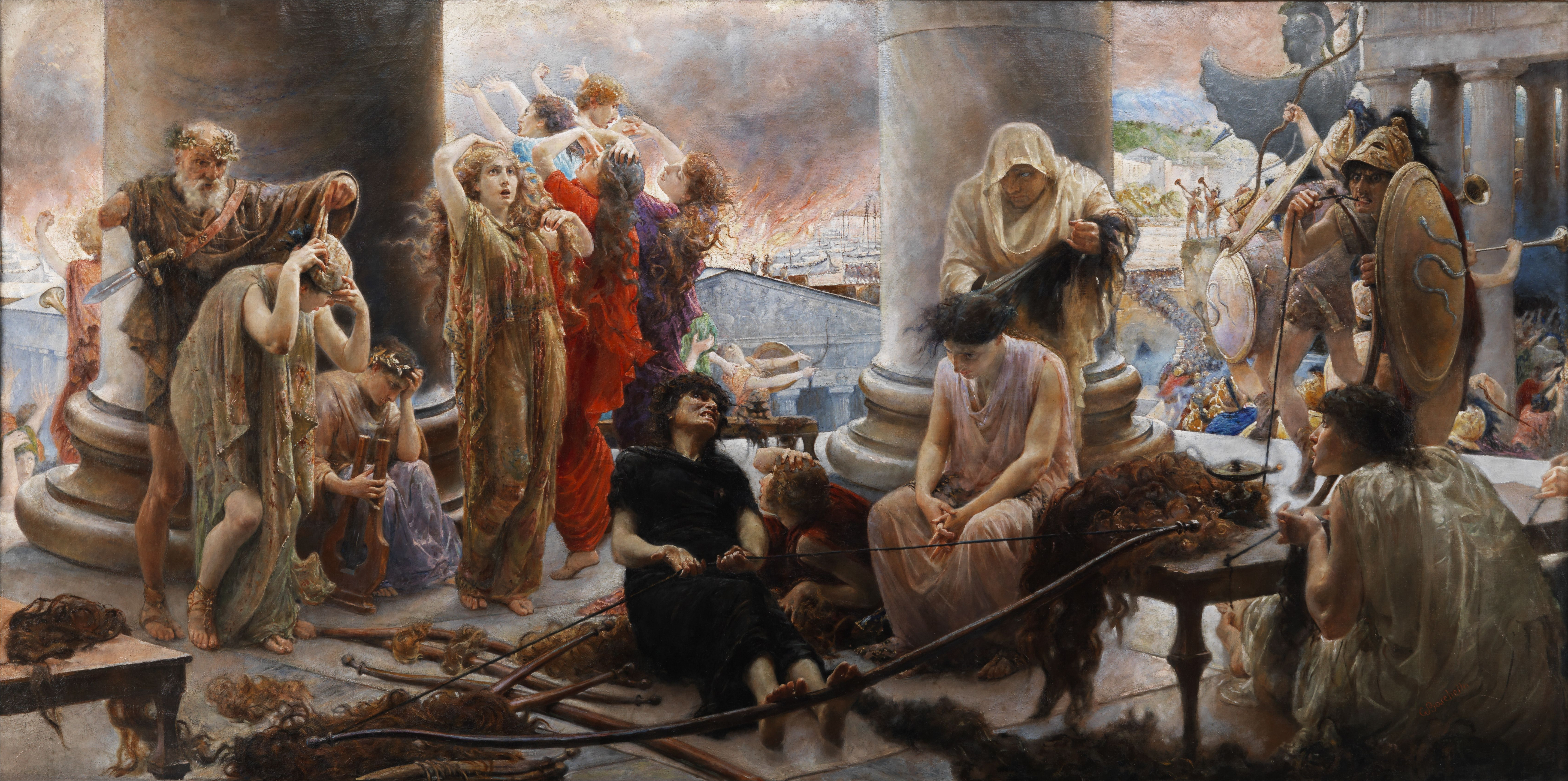 (Frauen opfern ihre langen Haare für die Kriegsproduktion von Seilen)